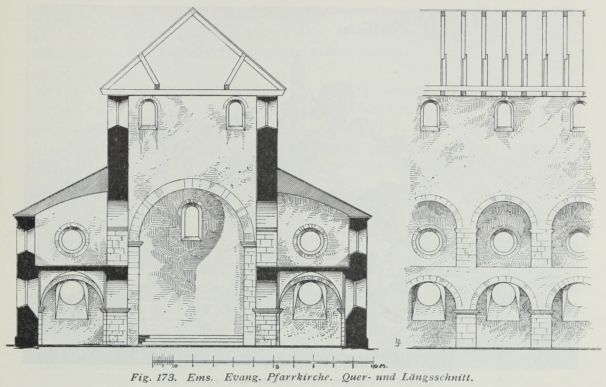 Ems evangelische Pfarrkirche Quer- und Längsschnitt